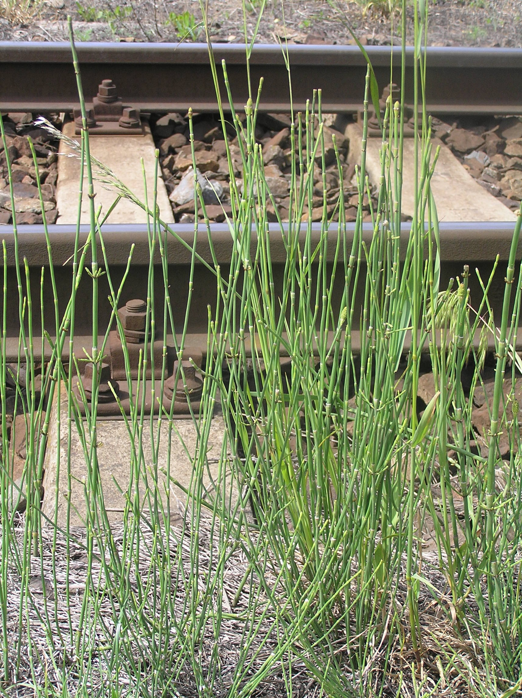 Equisetum ramosissimum, Brno - Židenice, Czech Republic